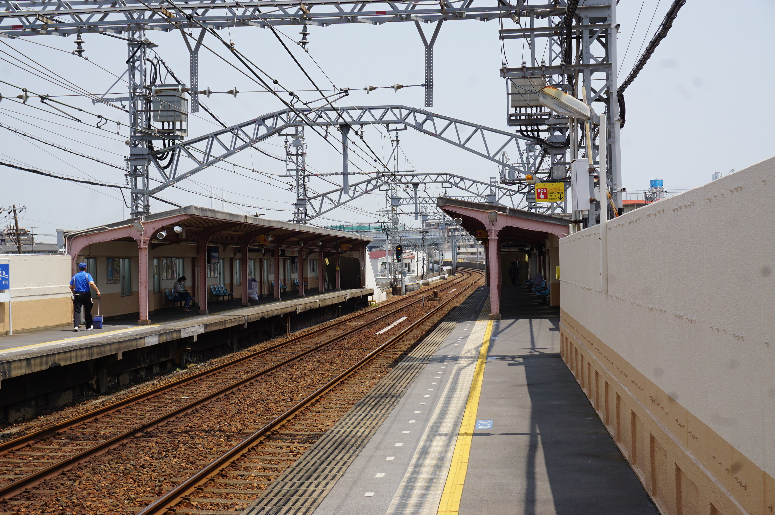 住吉駅のホーム